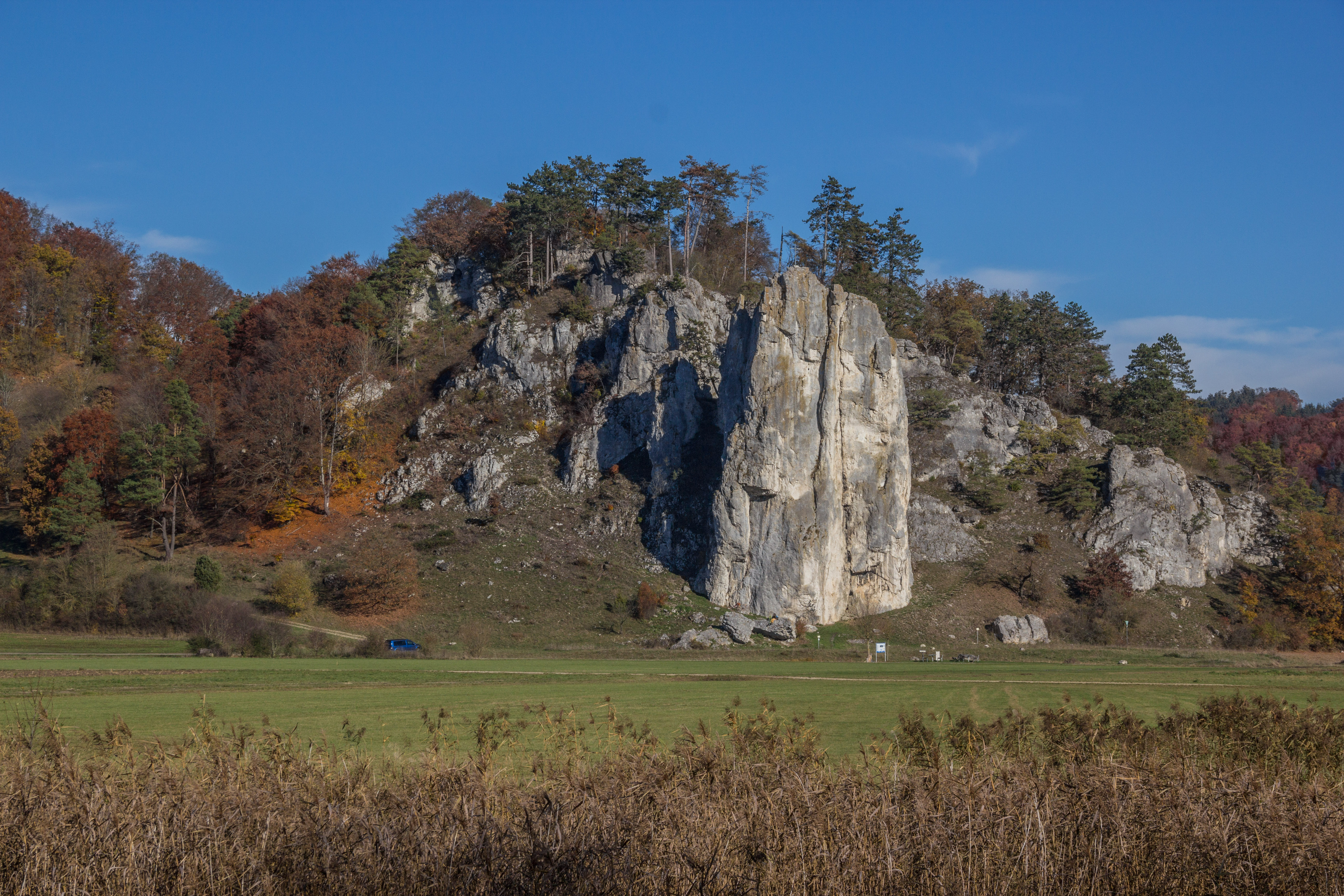 Burgstein, Dollnstein